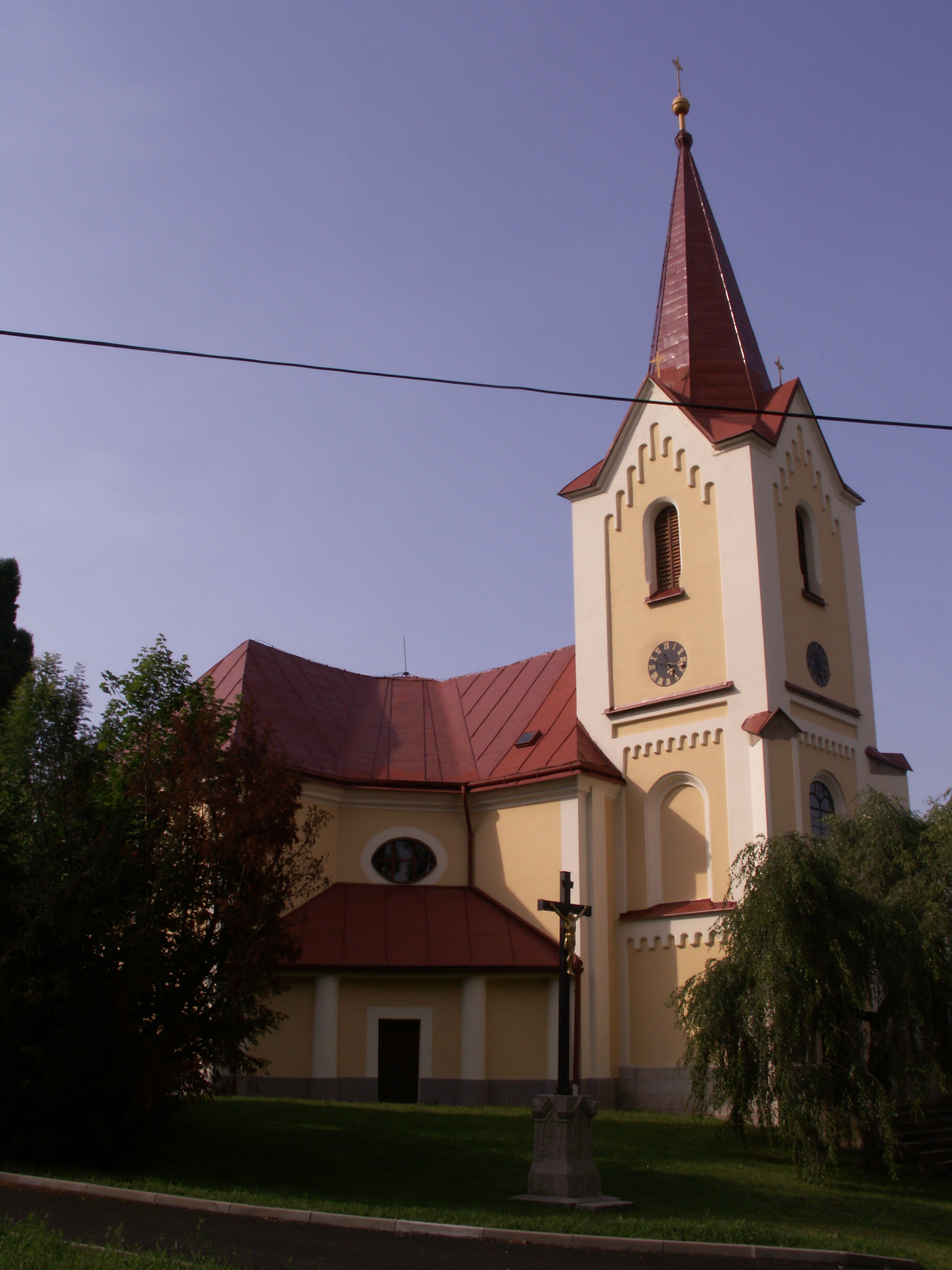 Kostel sv. Jana Nepomuckého (Nová Ves u Chotěboře), Nová Ves u Chotěboře